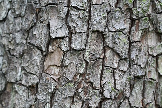 écorce d'arbre fruitier